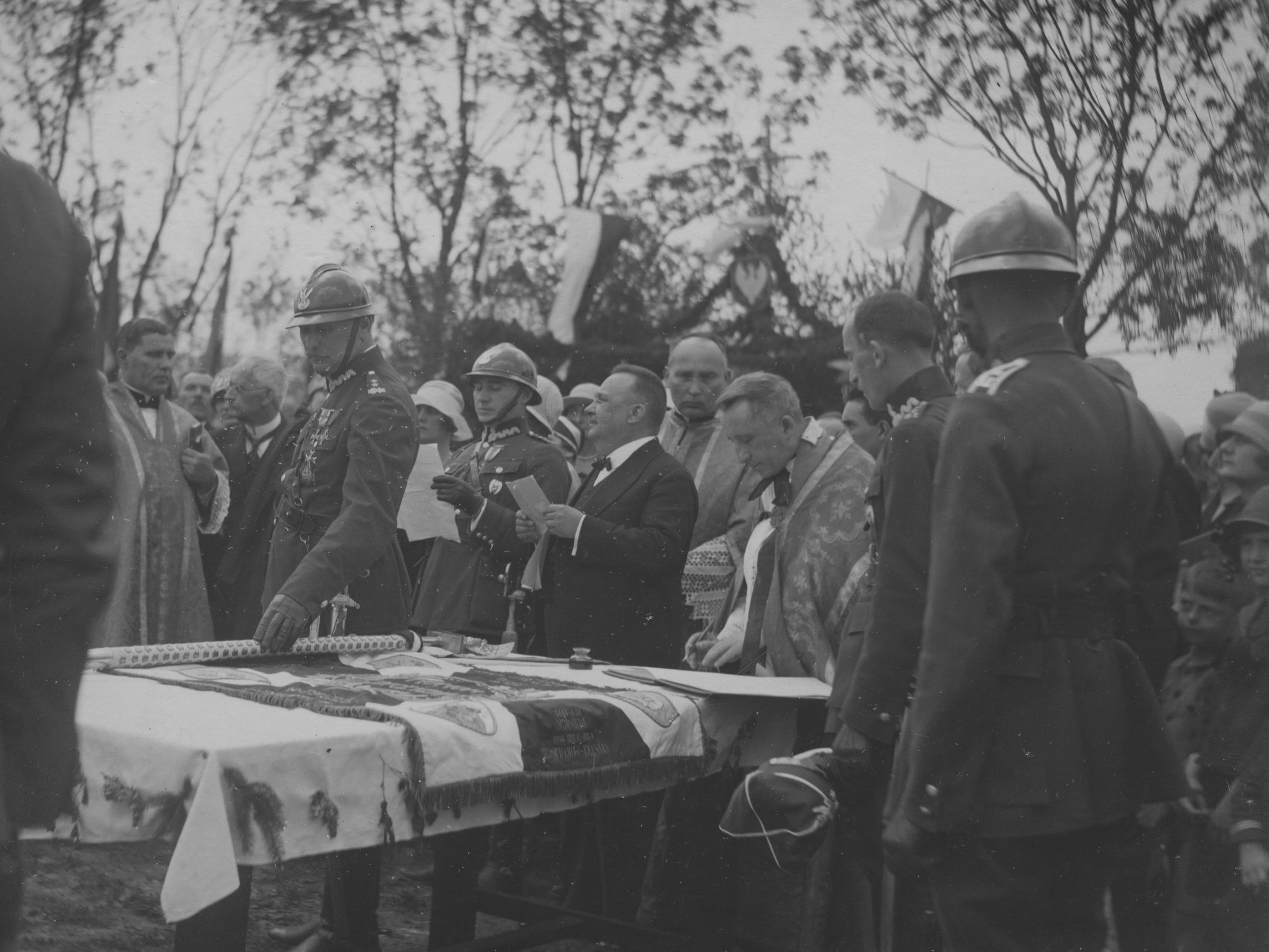 Święto 51 Pułku Piechoty Strzelców Kresowych w Brzeżanach 27 maja 1928. Przedstawiciele duchowieństwa, władz i wojska przy wbijaniu gwoździ w drzewce sztandaru. Koncern Ilustrowany Kurier Codzienny - Archiwum Ilustracji. Sygnatura: 1-W-1252-8